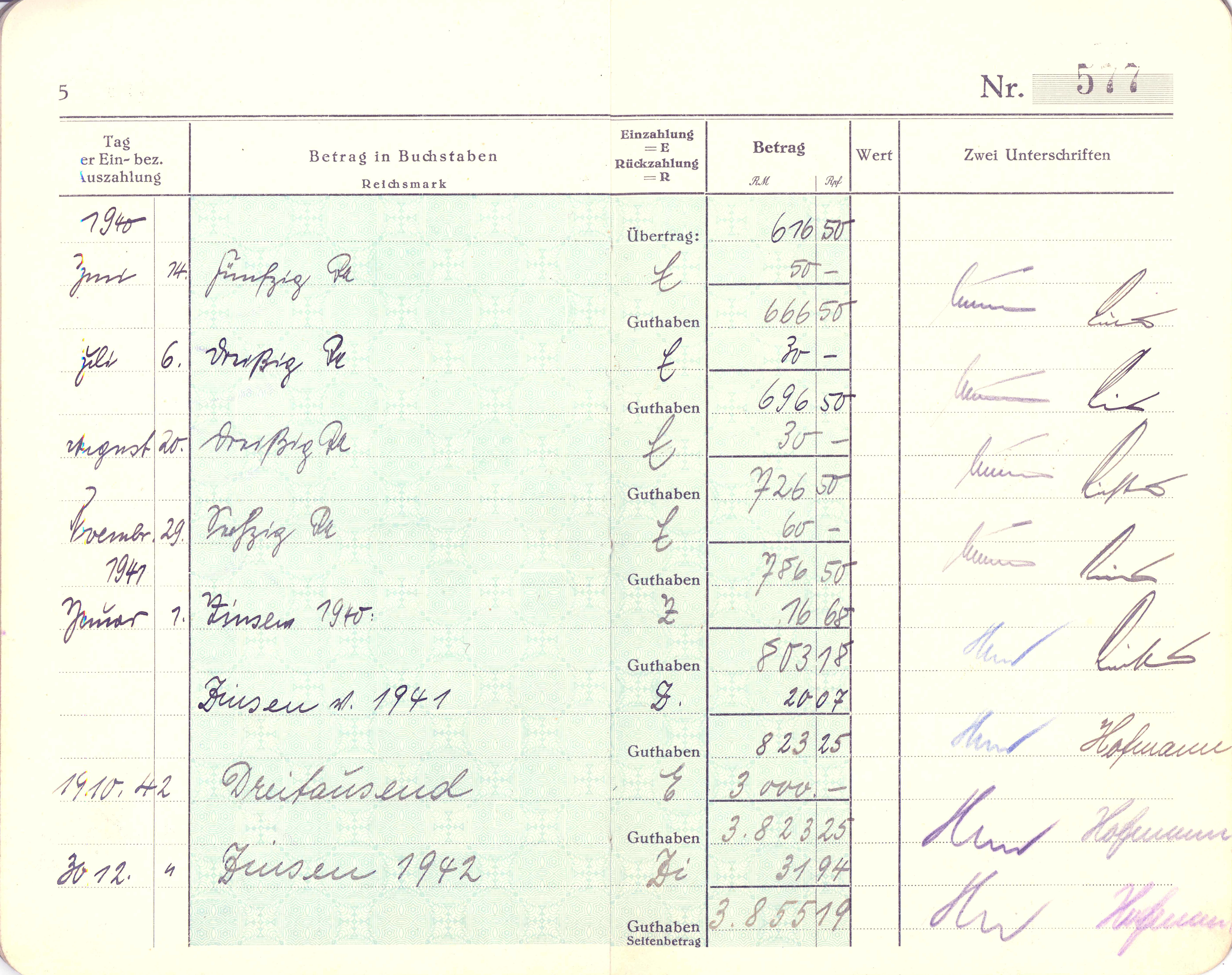 13.07.1935 Hilbersdorf bei Freiberg/Sa: Sparbuch der Girokasse Hilberdorf-Muldenhütten. Ausgestellt und Ersteinzahlung am 13. Juli 1935. 19350713009AR.JPG(c)Blobelt